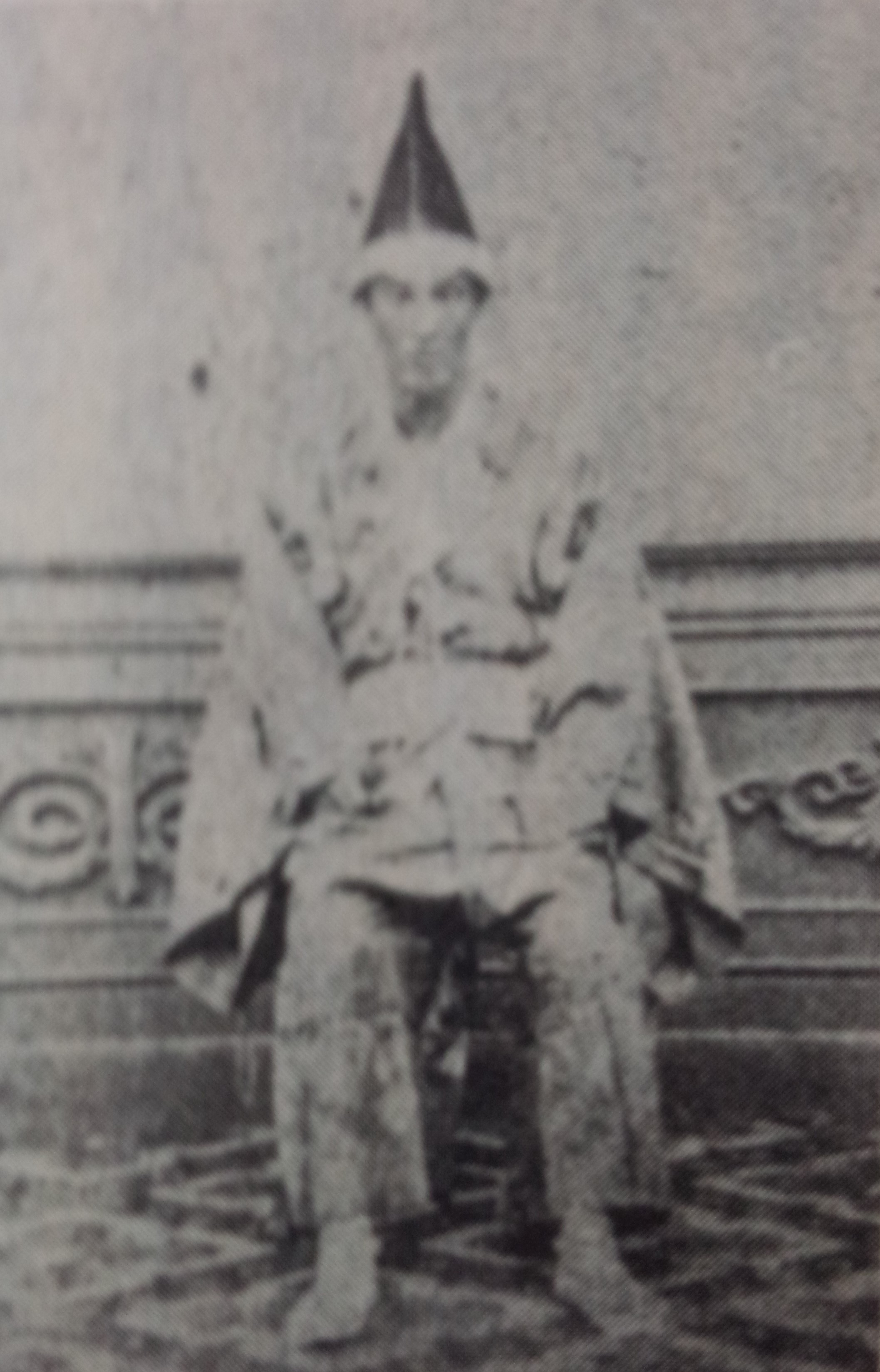 牧野康済の肖像写真。